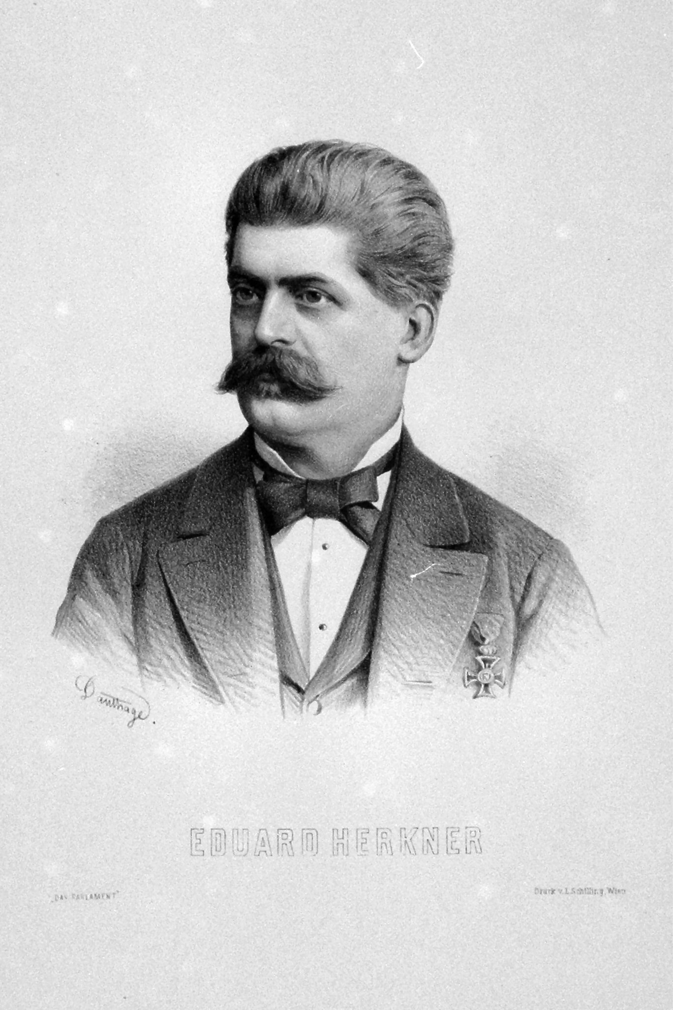 Eduard Herkner (1834-1914), Fabrikant, Politiker (Abgeordneter zum böhmischen Landtag). Lithographie von Adolf Dauthage, 1880